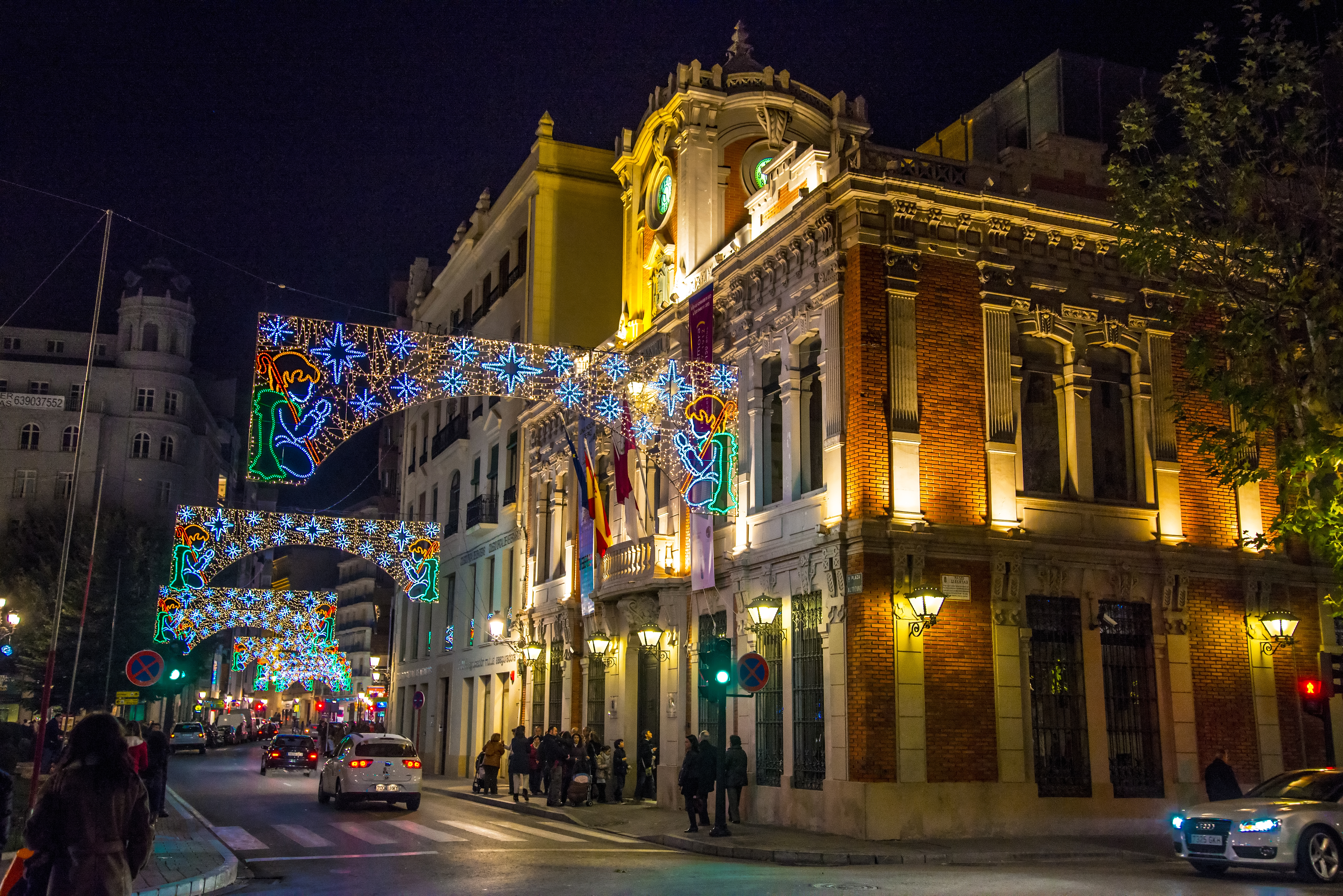 Albacete nocturno